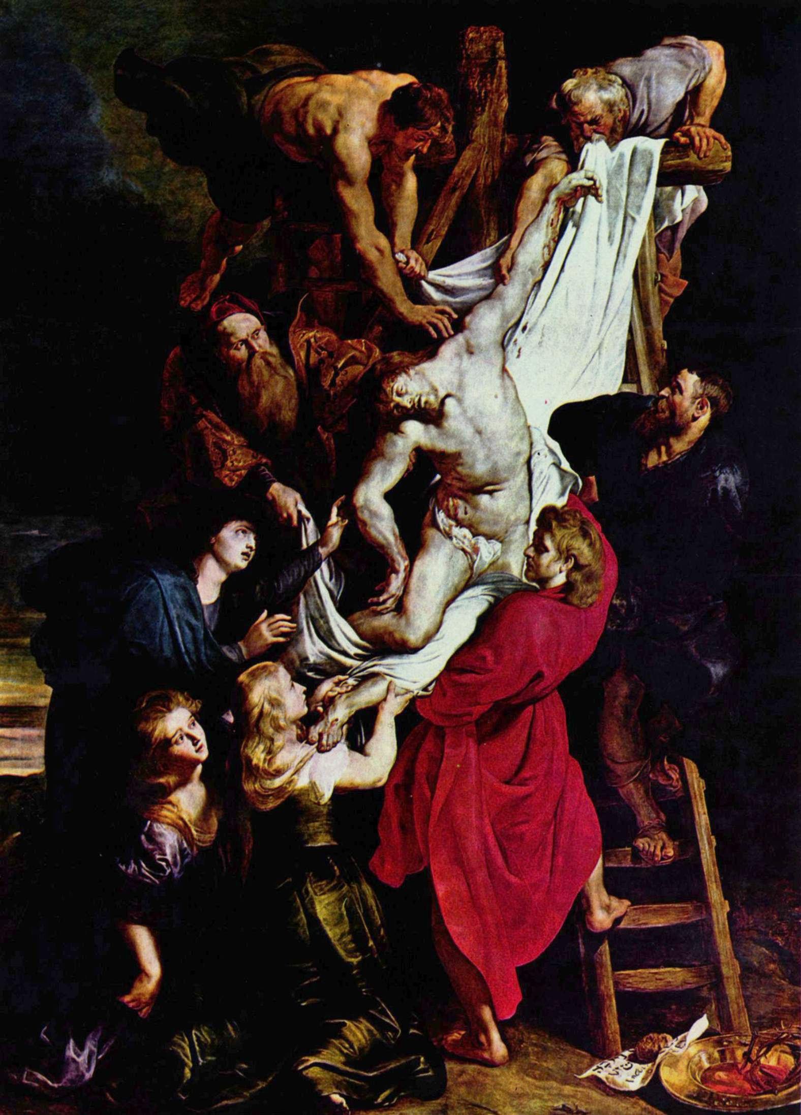 Triptych, Middle Panel